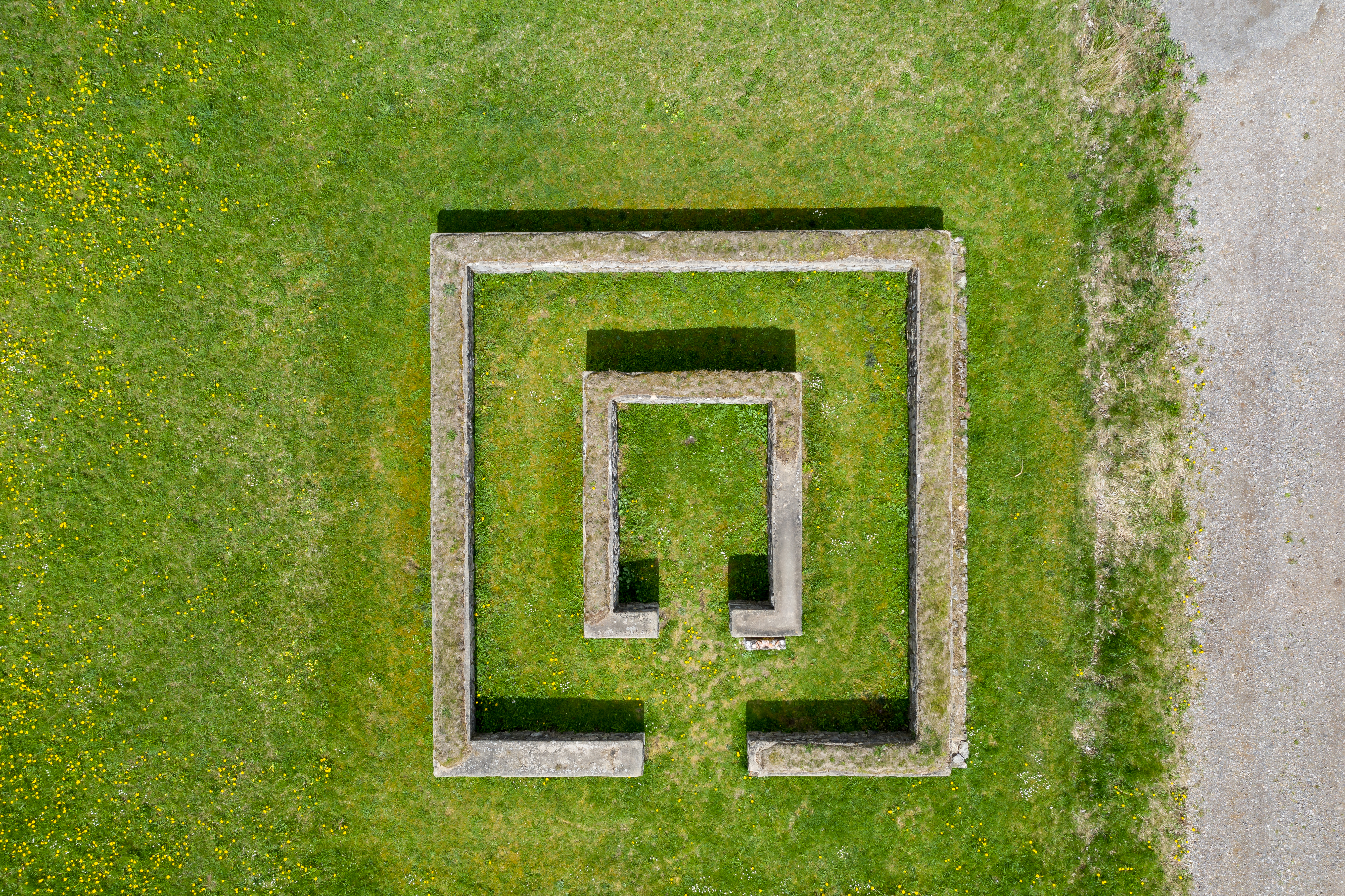 Tempelheiligtum Zingsheim aus der Luft